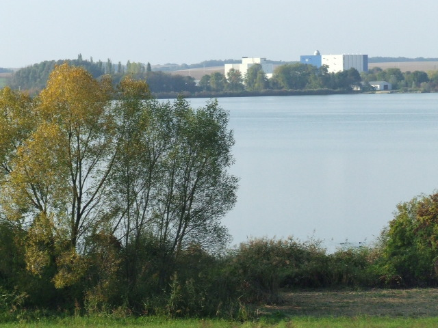 Halastó, háttérben a Délhús Rt. húsfeldolgozója